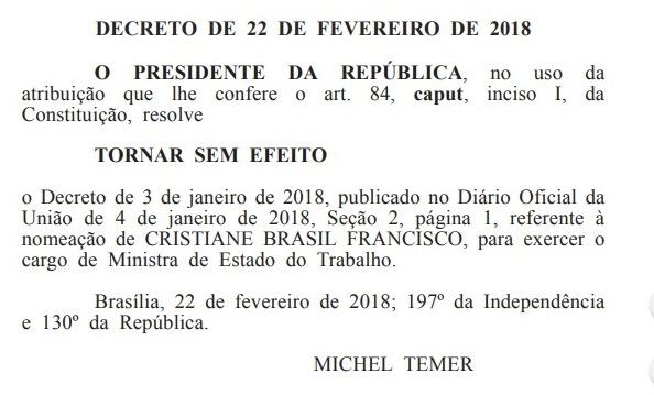 Decreto de 22 de fevereiro de 2018 em que o presidente da República, Michel temer, torna sem efeito o decreto de nomeação de Cristiane Brasil Francisco para o cargo de ministra de Estado do Trabalho do Brasil.